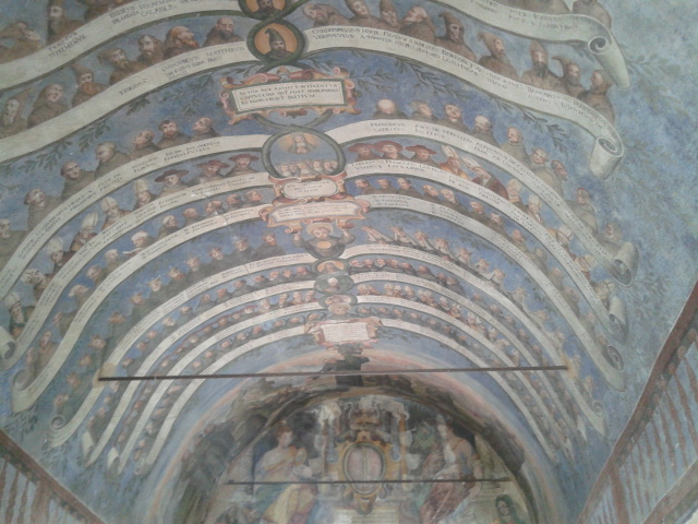 Affreschi nel chiostro di San Francesco